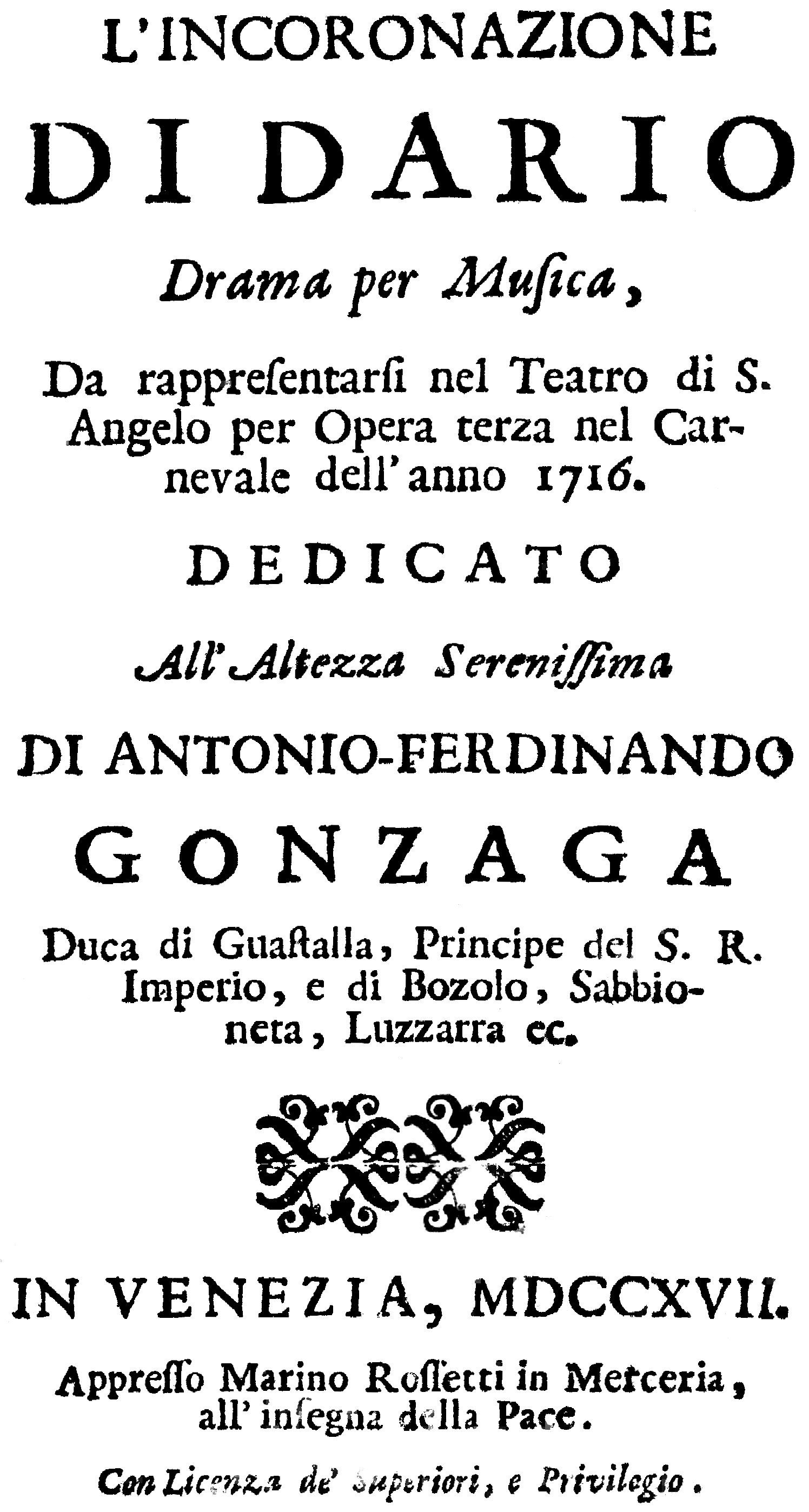 Antonio Vivaldi's "L'incoronazione di Dario" libretto cover.